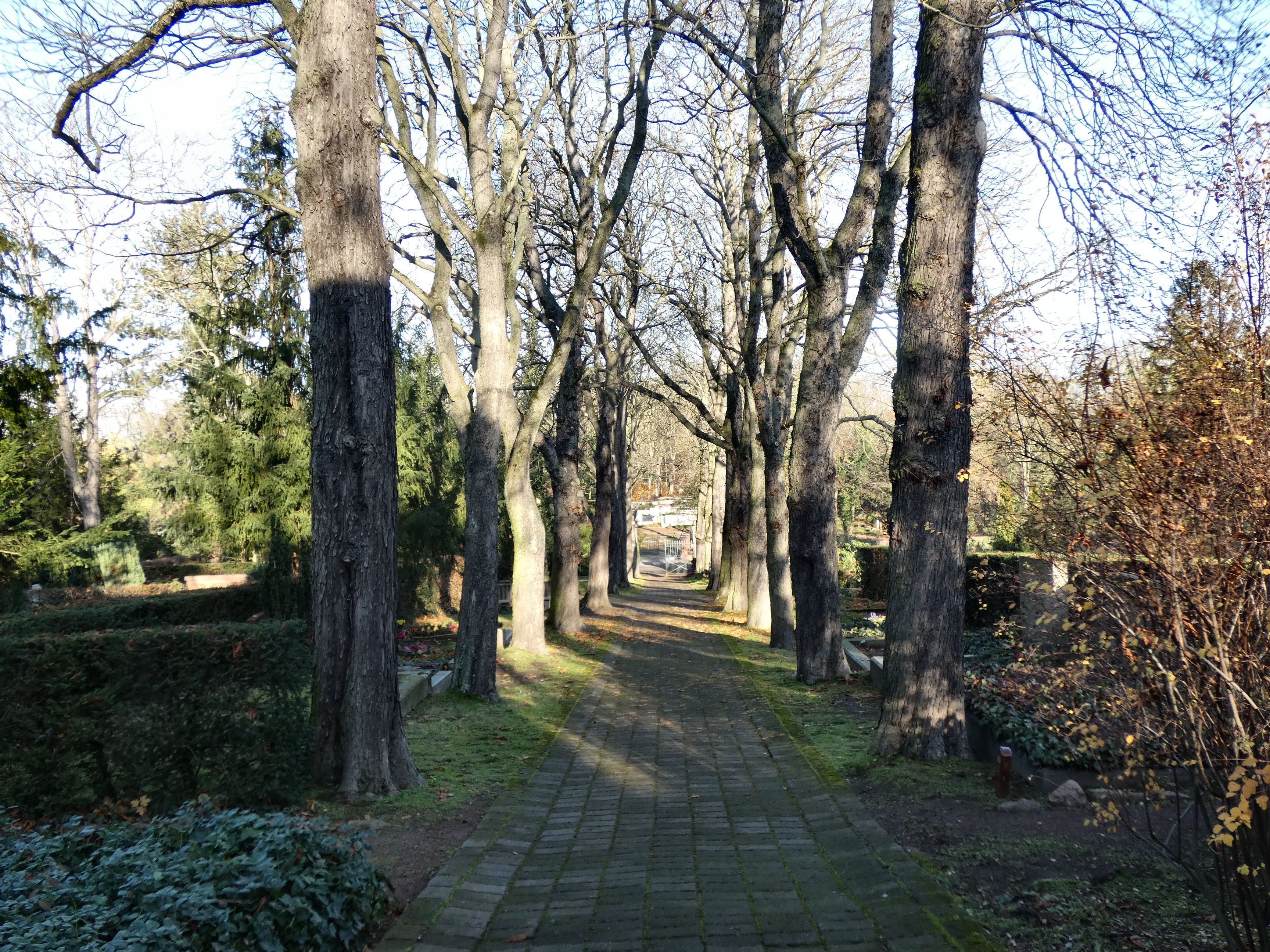 Baumallee im alten Teil des Friedhofs Kröllwitz, Halle (Saale), Lettiner Straße